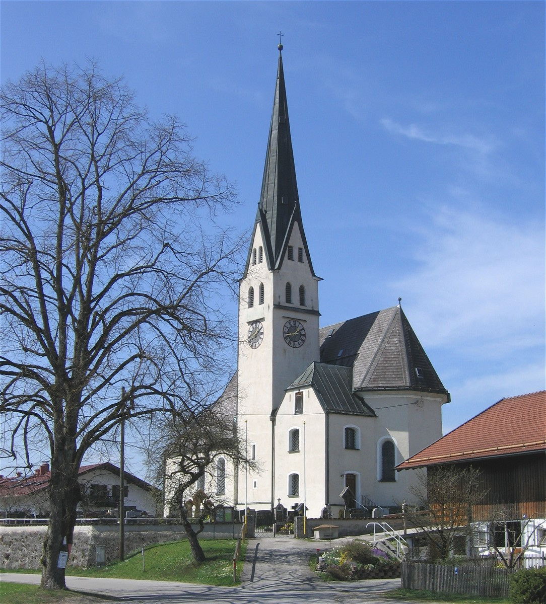 Sachsenkam, Oberbayern